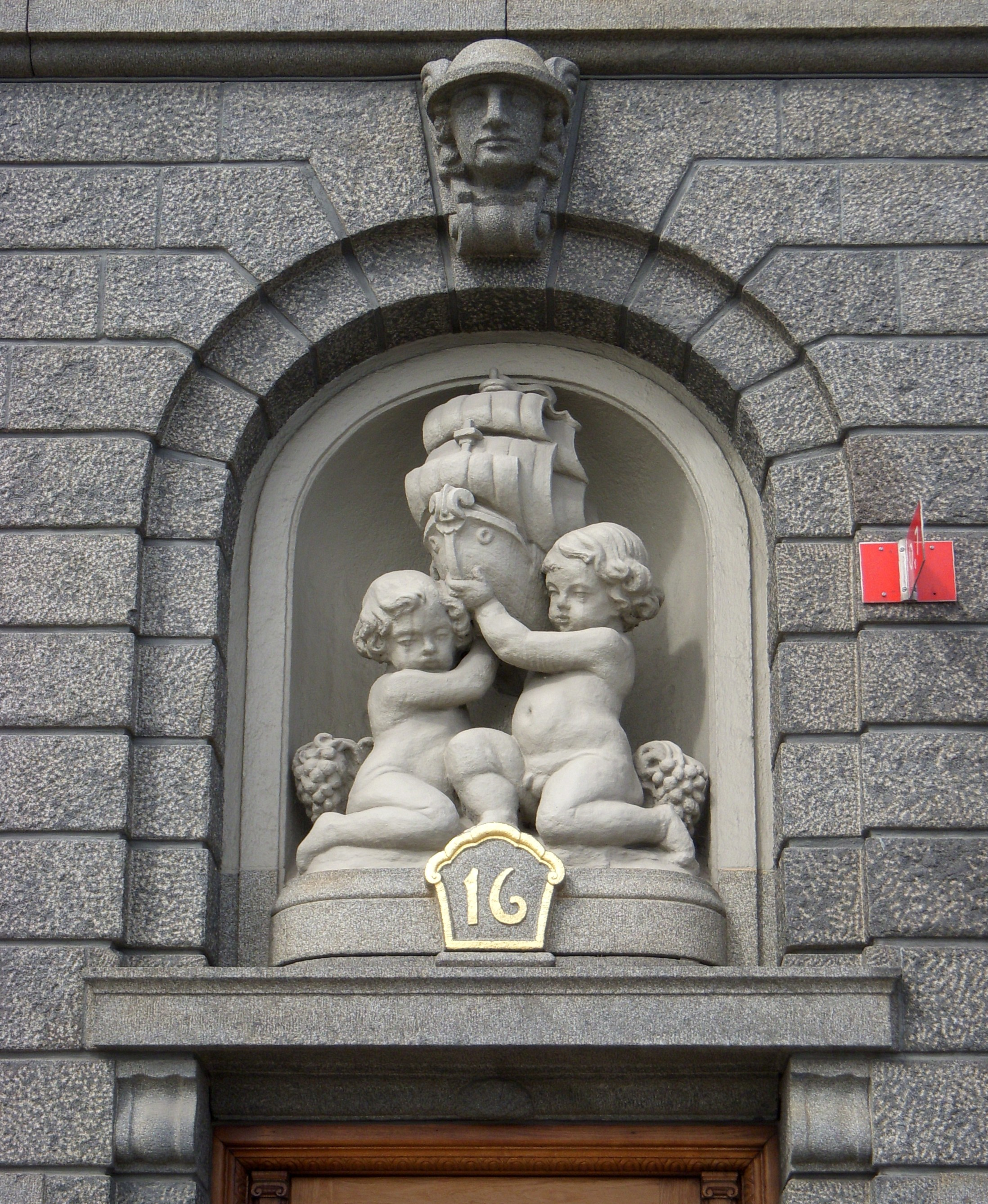 Skeppsbron nr 16, Stockholm, Portalutsmyckning